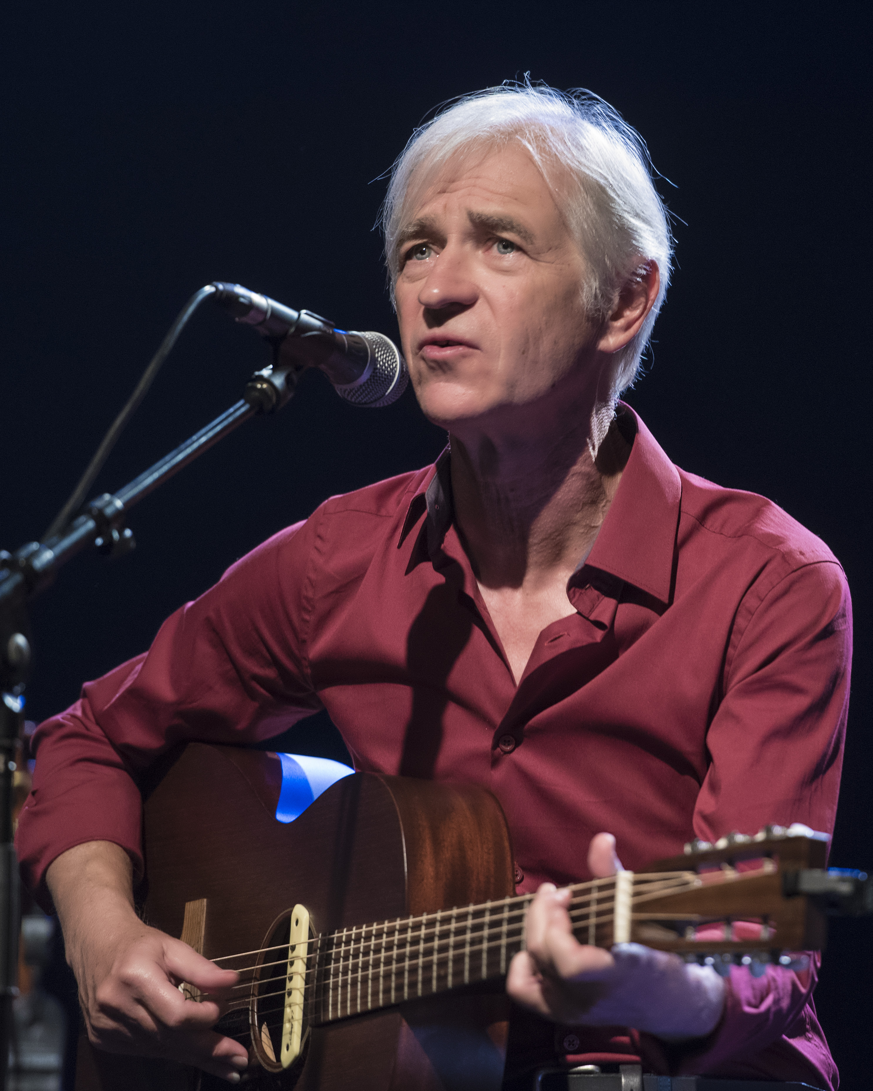 Erik Van Neygen in CC De Muze in Meise in 2017